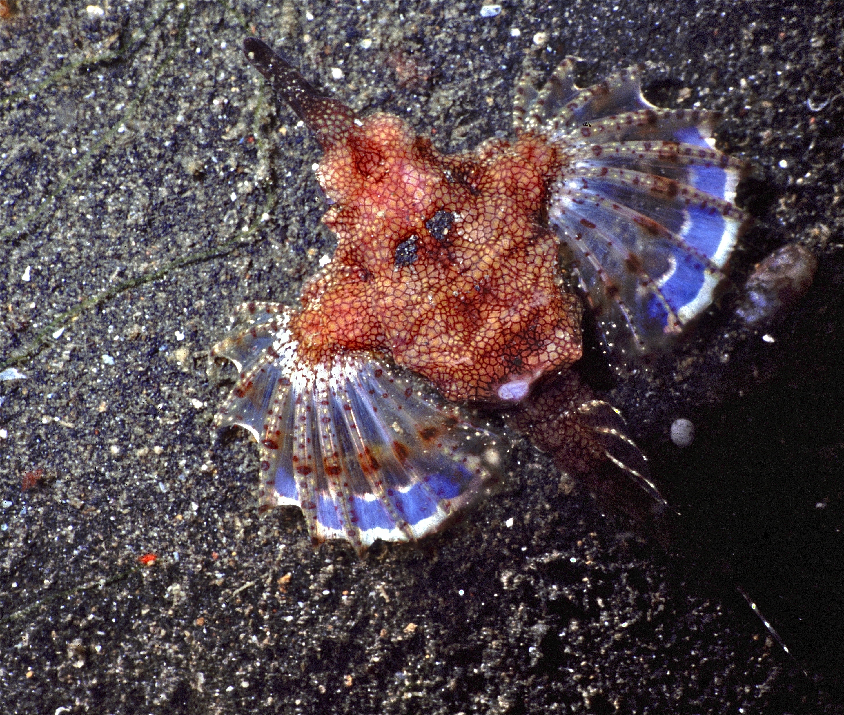 Lembeh Strait, Sulawesi, INDONESIA